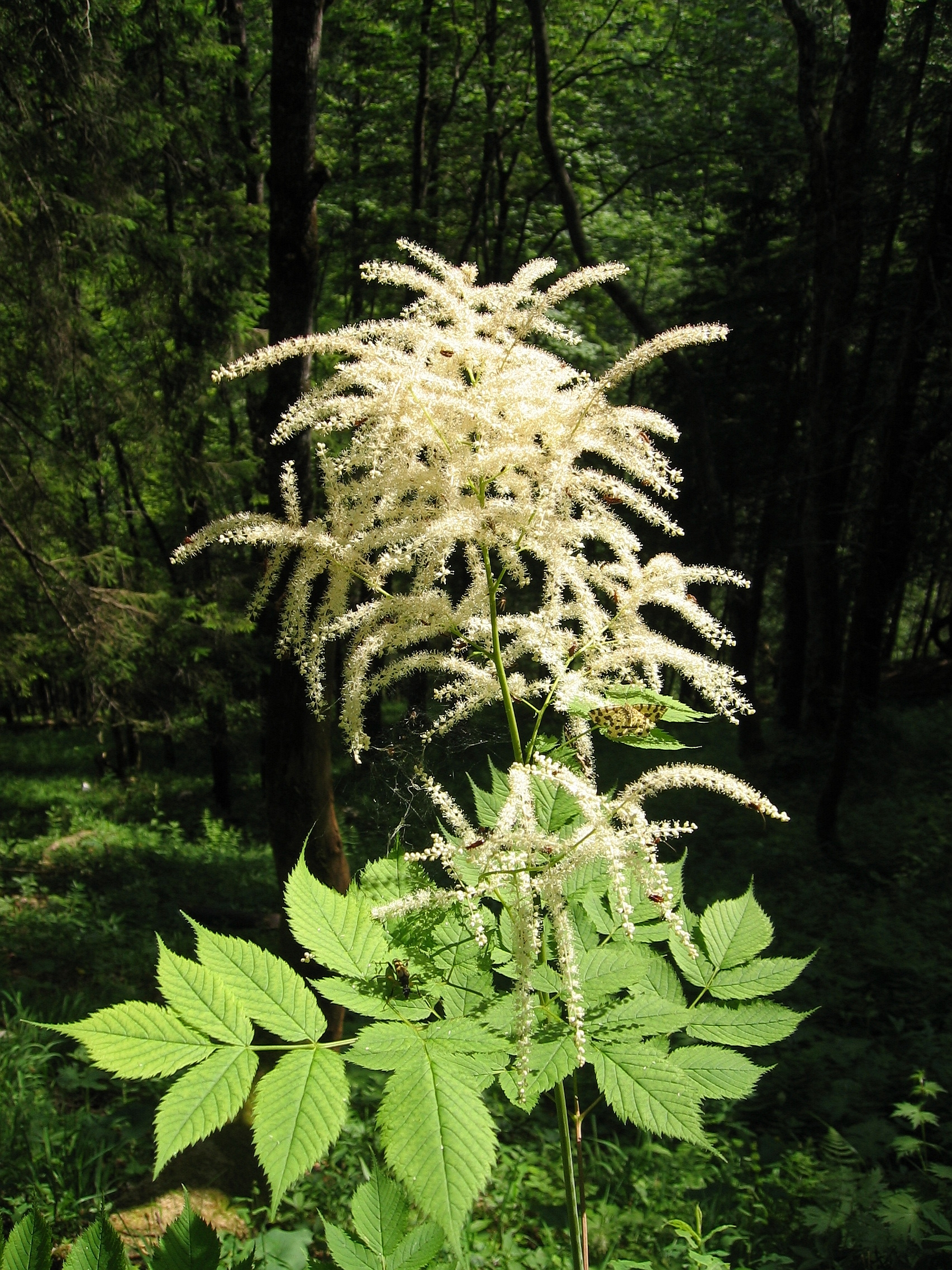 Aruncus dioicus (Rosaceae, Spiraeoideae), Hinterstoder, Upper Austria, Austria